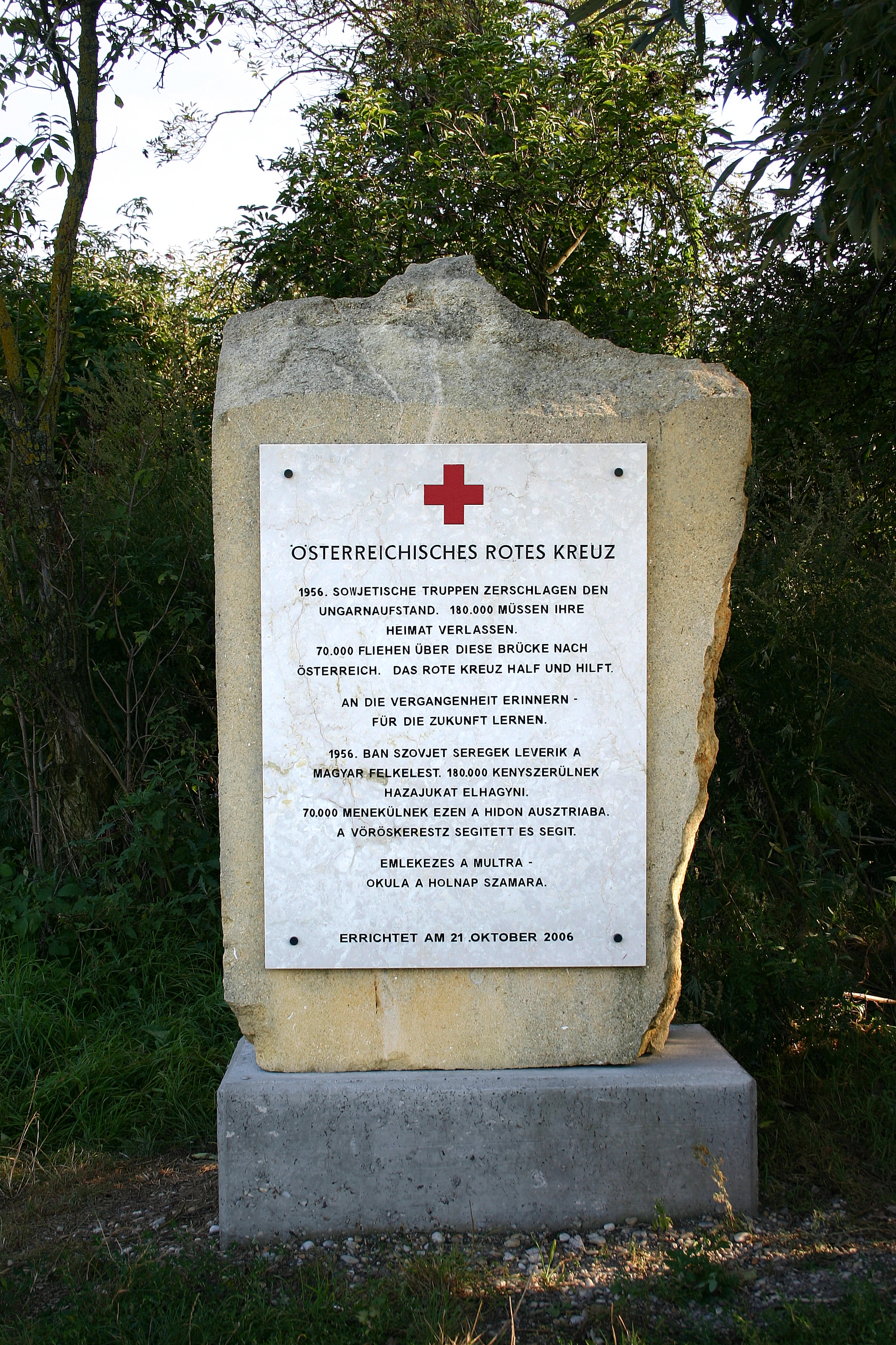 Andau – Gedenkstein des Österreichischen Roten Kreuz anlässlich des 50. Jahrestages des Ungarischen Volksaufstands bei der Brücke von Andau